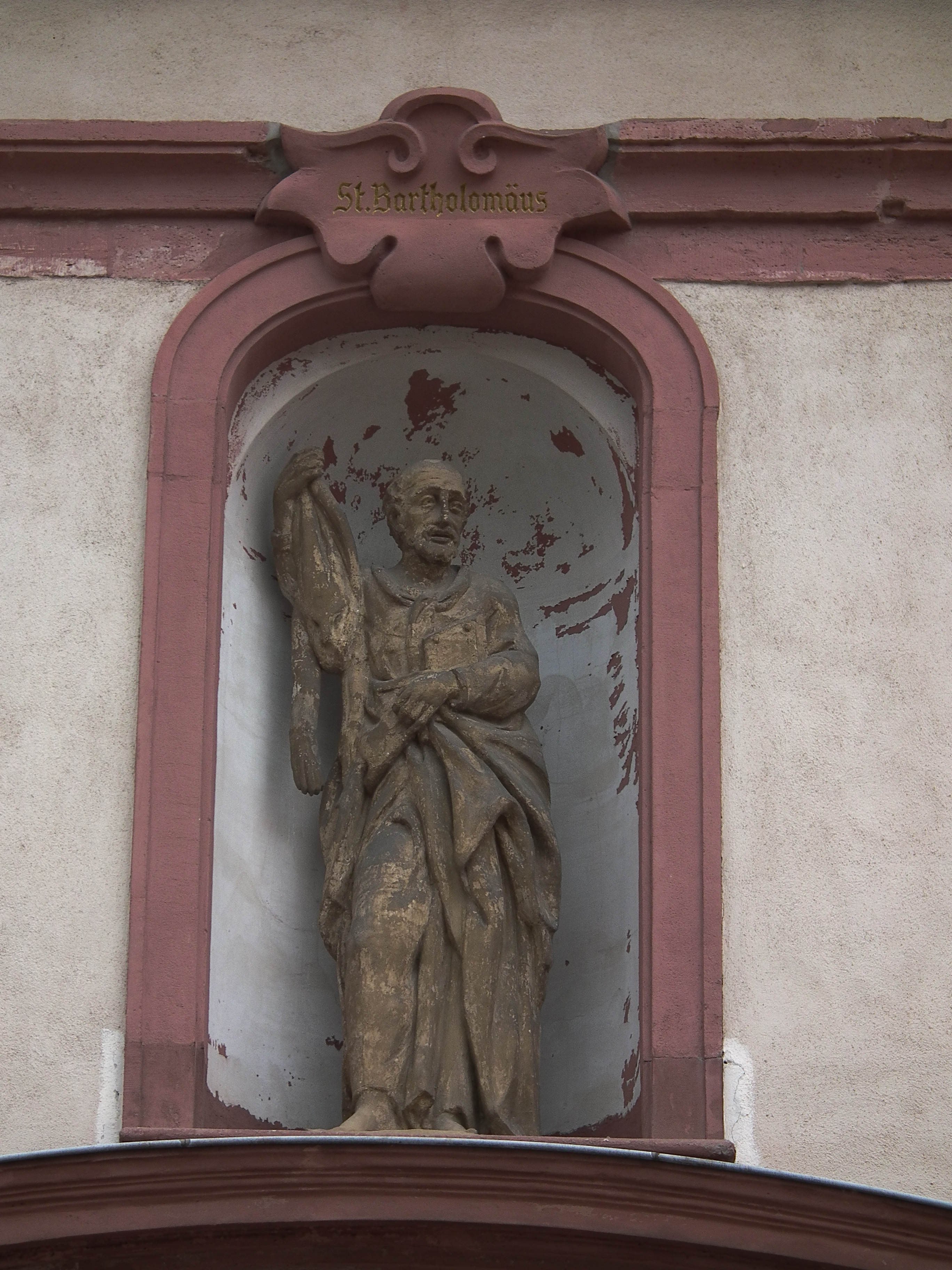 Darstellung des Sankt Bartholomäus an der katholischen Pfarrkirche St. Bartholomae im Heidelberger Stadtteil Wieblingen (Baden-Württemberg, Deutschland)